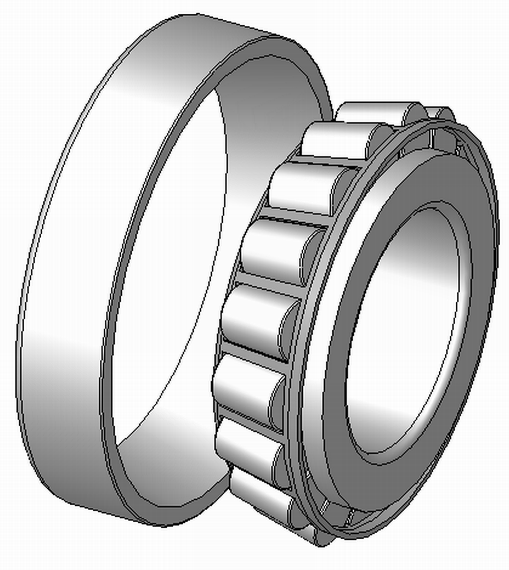 Kegelrollenlager, mit Blechkaefig aus Stahl, zerlegbar, Explosionsdarstellung, Hinweis: Innenaufbau des Lagers (insbesondere des Kaefigs) variiert je nach Hersteller und Baugroesse rolling contact bearings